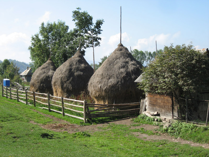 Boarisch: Haimandl (Heumännchen) in Rosia Montana, Rumänien (Foto August 2007)